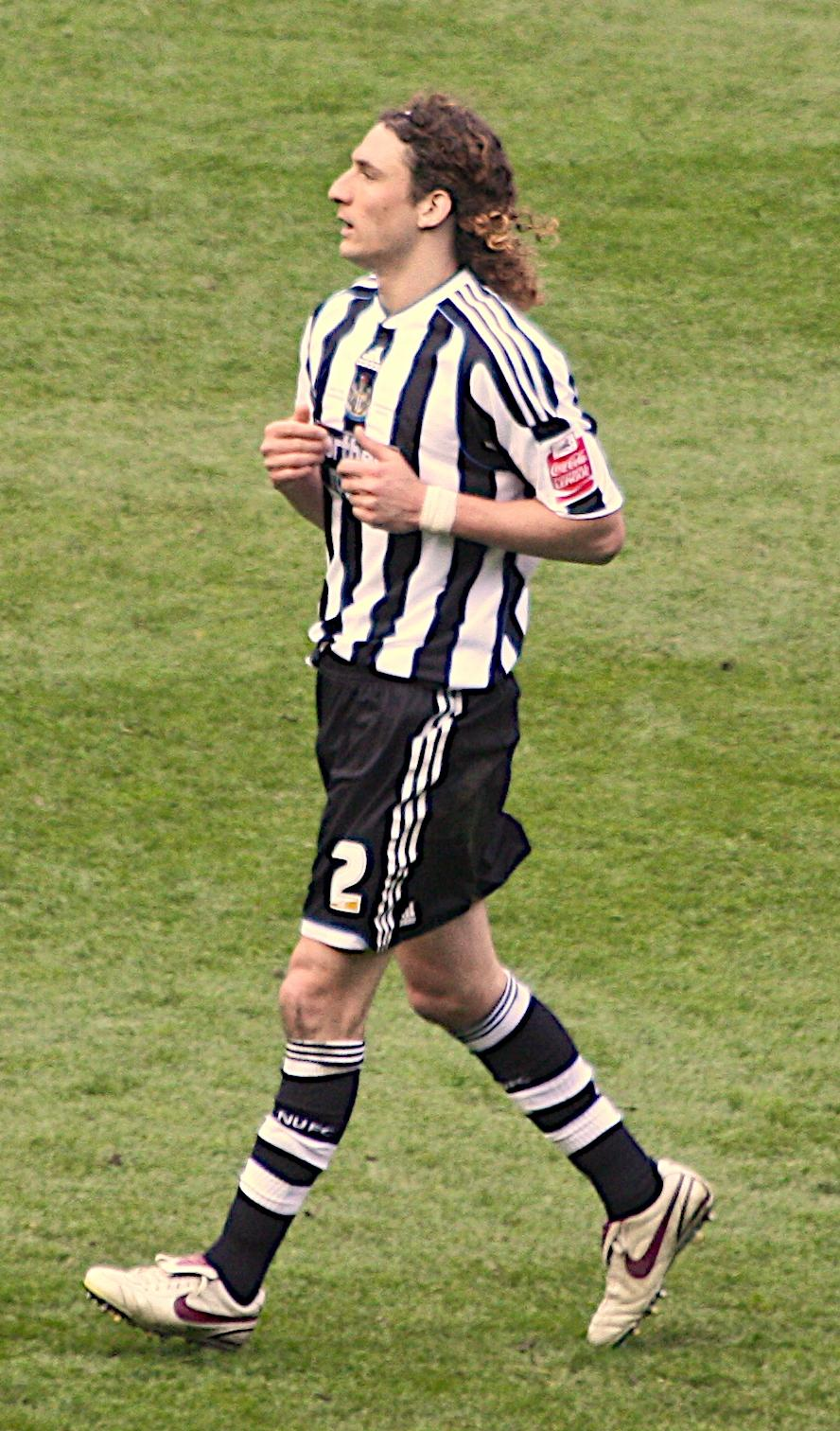 Colo